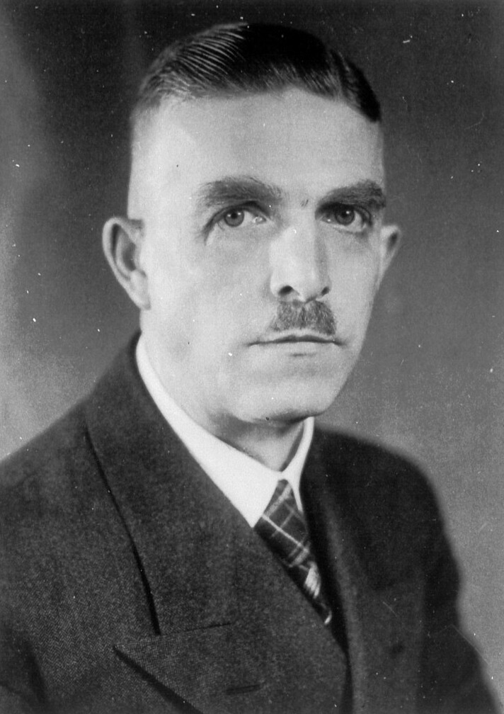 Friedrich Uhlhorn (1894-1978), ab 1940 Honorarprofessor für Geschichte und Heimatgeschichte in Marburg